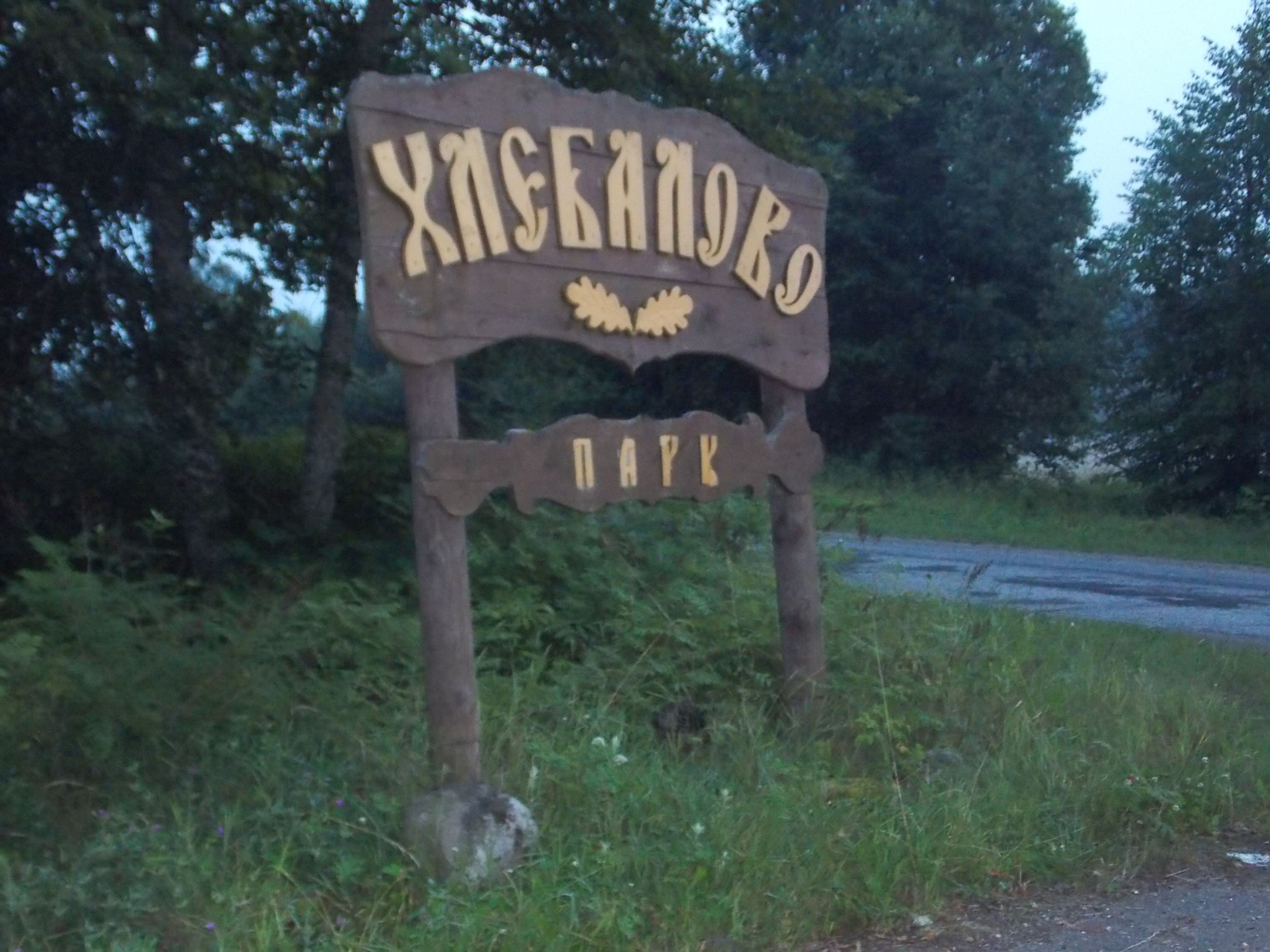 Пейзажный парк «Хлебалово»: в подросте - осина, ива, липа, лещина, ольха., Велилы, Марёвский район, Новгородская область This image is related to the protected area of Russia number 5310170